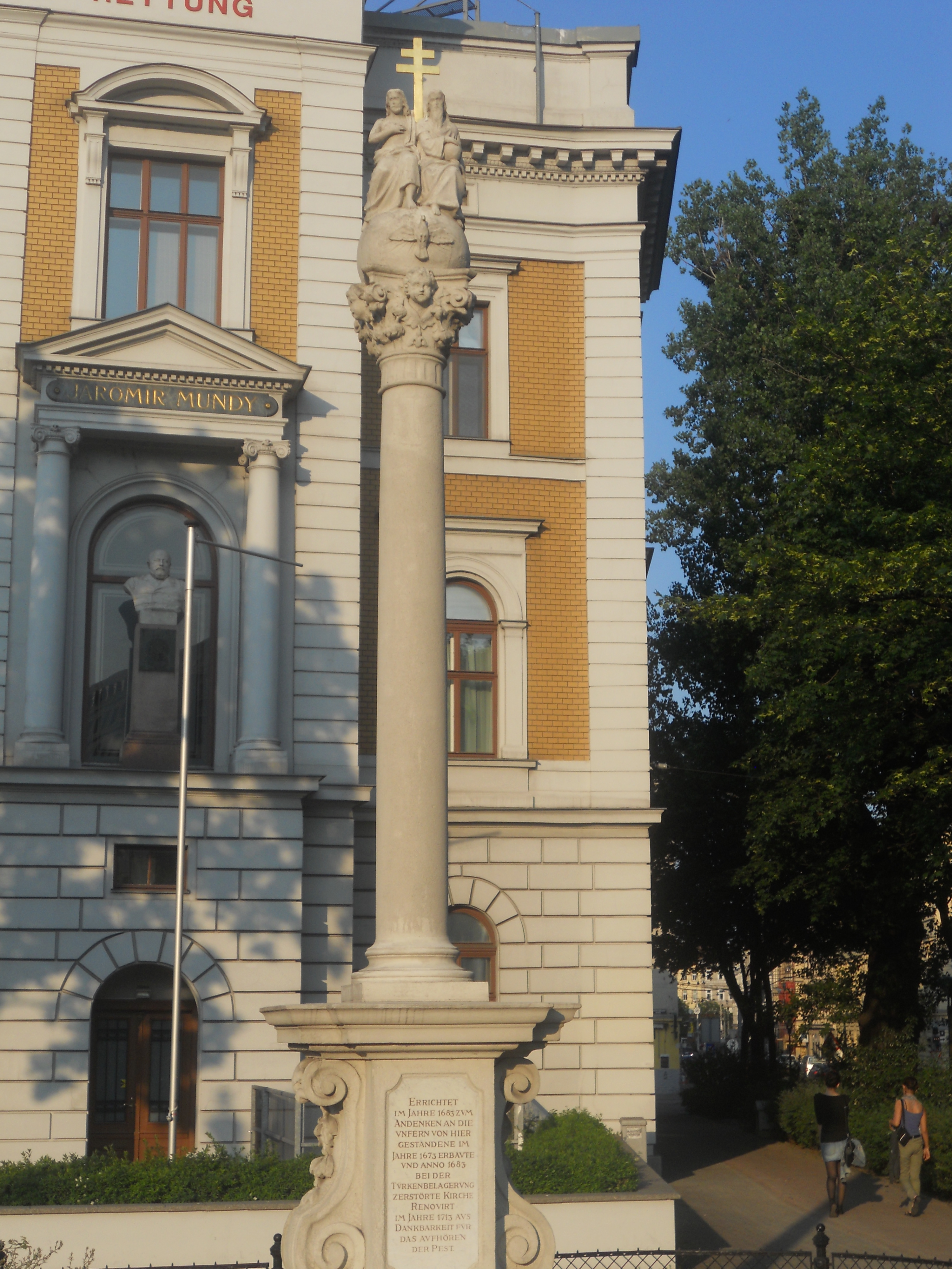 Dreifaltigkeitssäule vor dem Hauptgebäude der Wiener Rettung